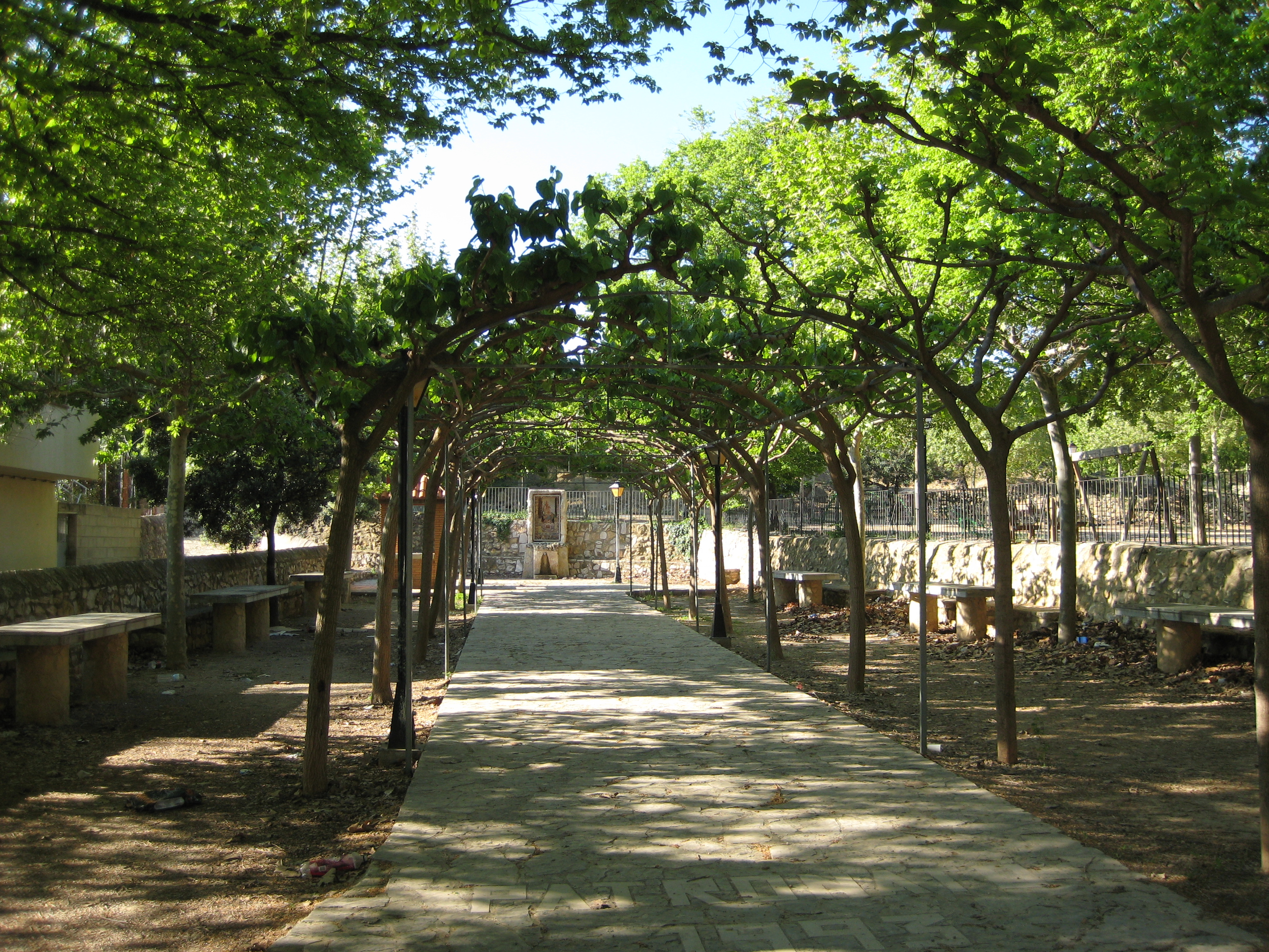 Berenador de l'ermita de la Mare de Déu del Socós de Càlig (Baix Maestrat)